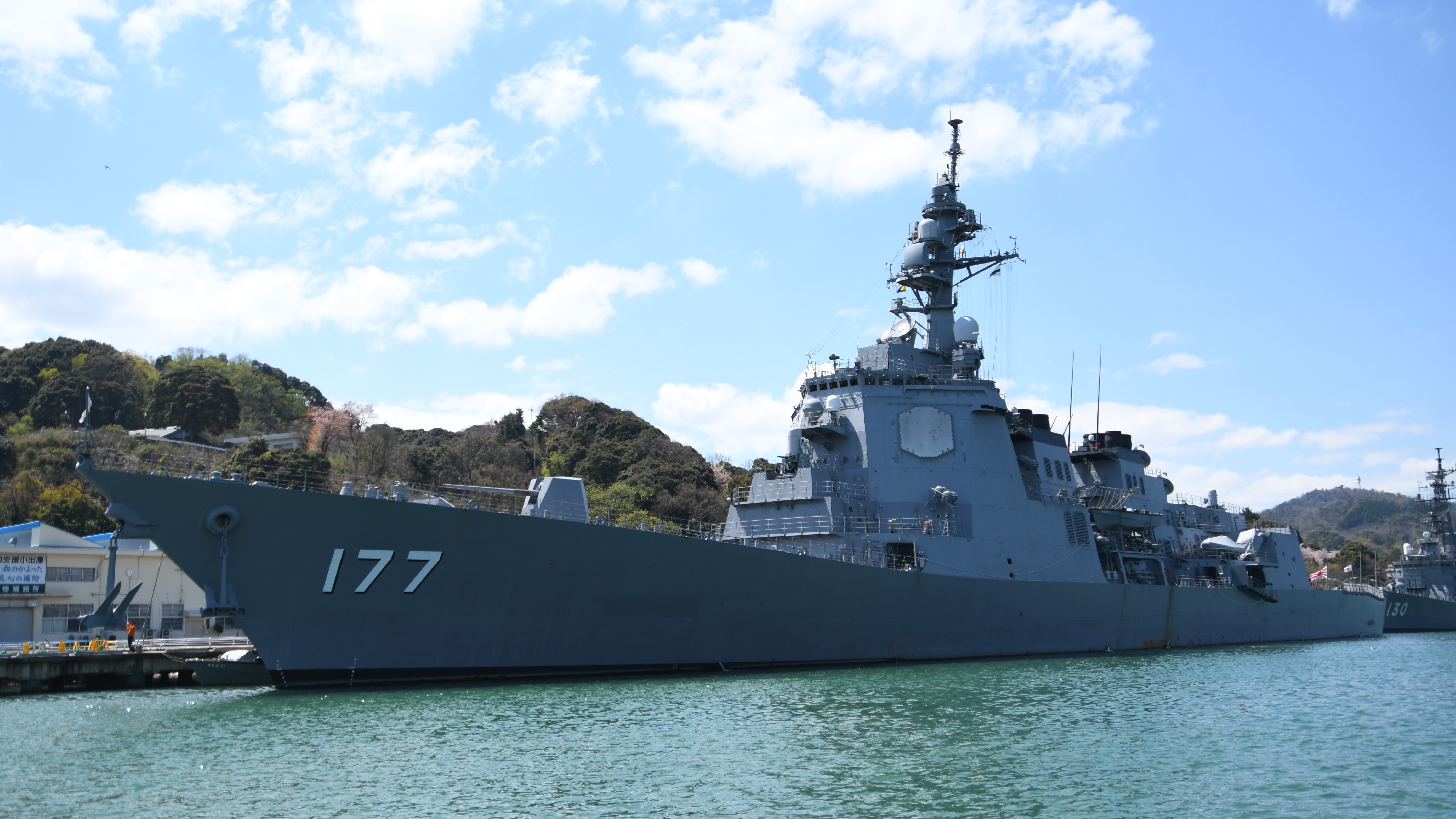 海上自衛隊 護衛艦あたご（DDG-177） 左舷前面。2019年4月13日 舞鶴基地にて。